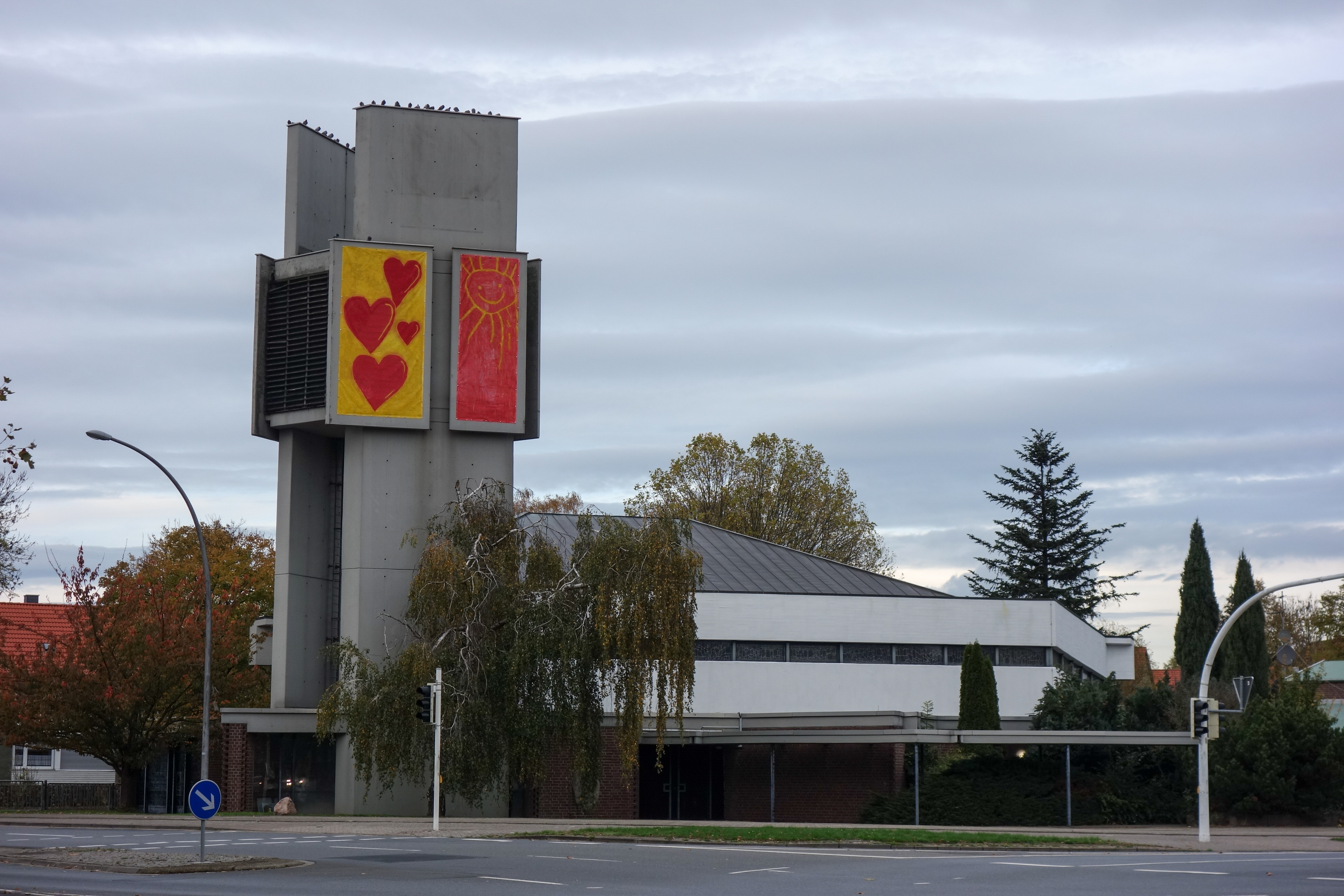 Turm der St.-Elisabeth Kirche mit den von Kindern gestalteten großformatigen Planen (Quelle: Salzgitter-Zeitung vom 26. Mai 2019). Ansicht von Süden.